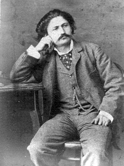 Sava Henția - Fotografie de la sfarșitul secolului al XIX-lea